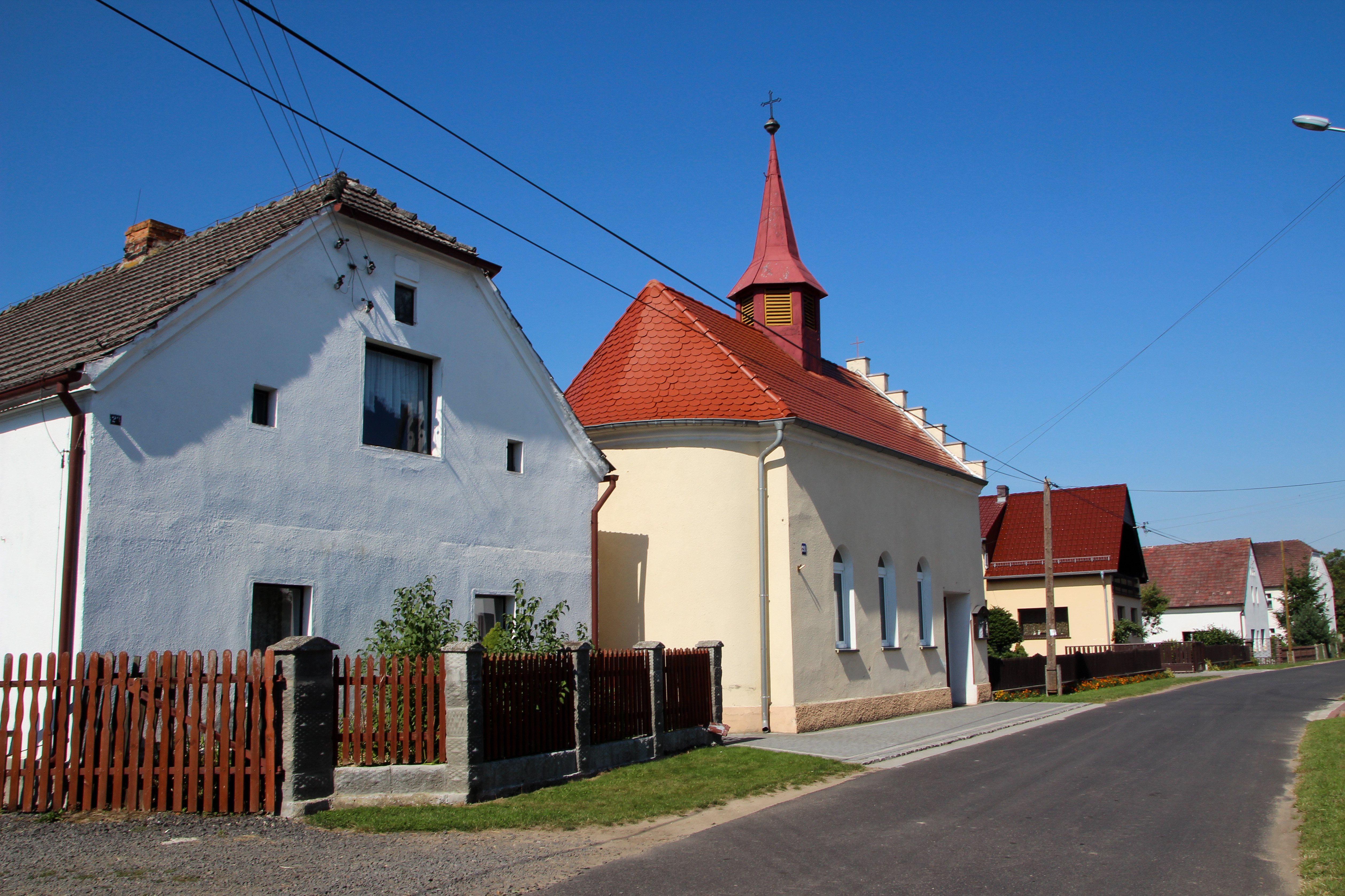 Kaplica Trójcy Świętej w Piechocicach – wieś w Polsce, w województwie opolskim, w powiecie nyskim, w gminie Korfantów.